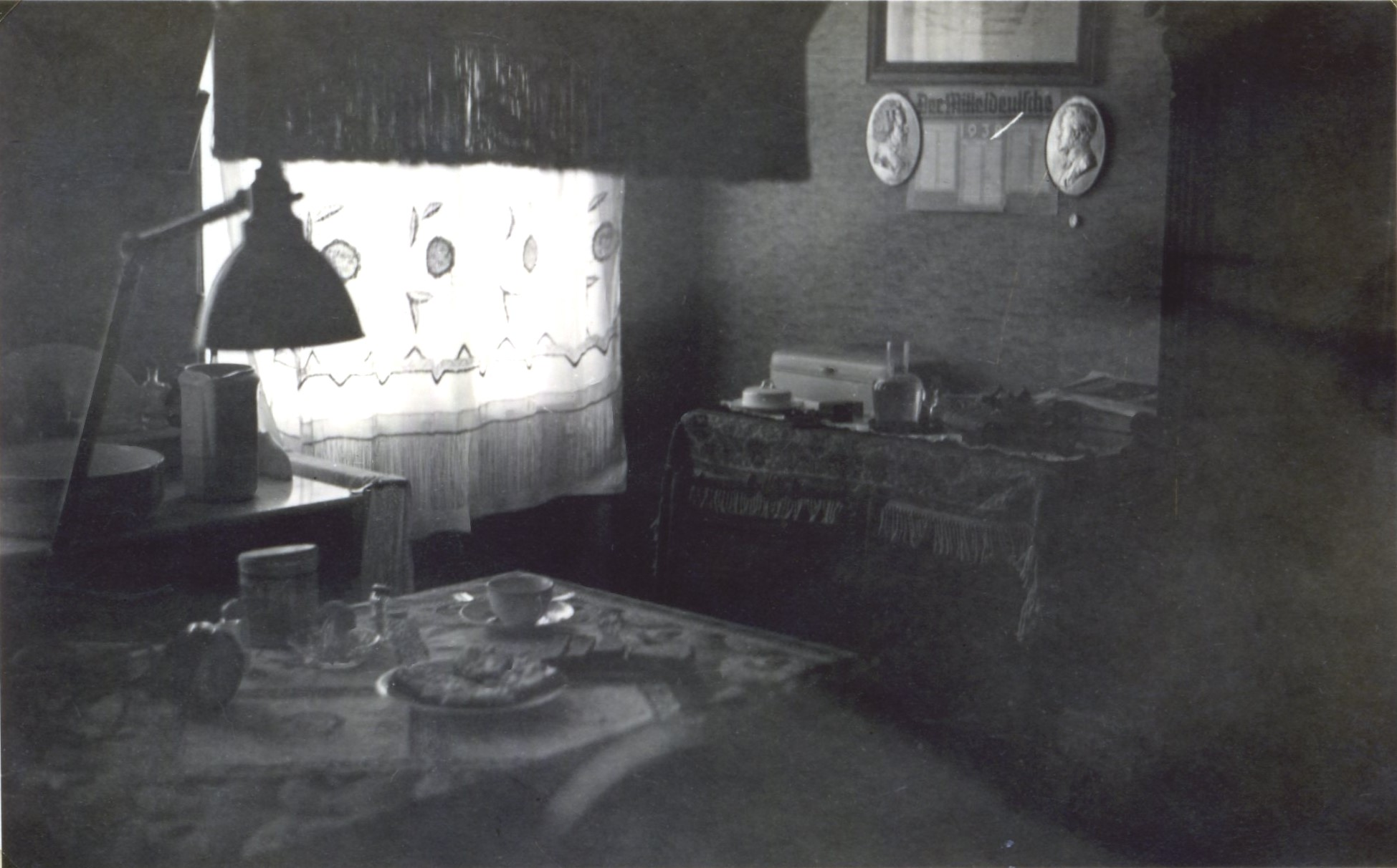 Haus Sudenburger Straße 23, (1. Eingang, 3. Etage, Wohnung der Witwe Anna Schön, Zimmer des Untermieters Heinz Meister) in Magdeburg, wohl 1938, (zumindest jedoch zwischen 1.5.1937 und 1.8.1940), Miete mit Vollverpflegung 105 Mark